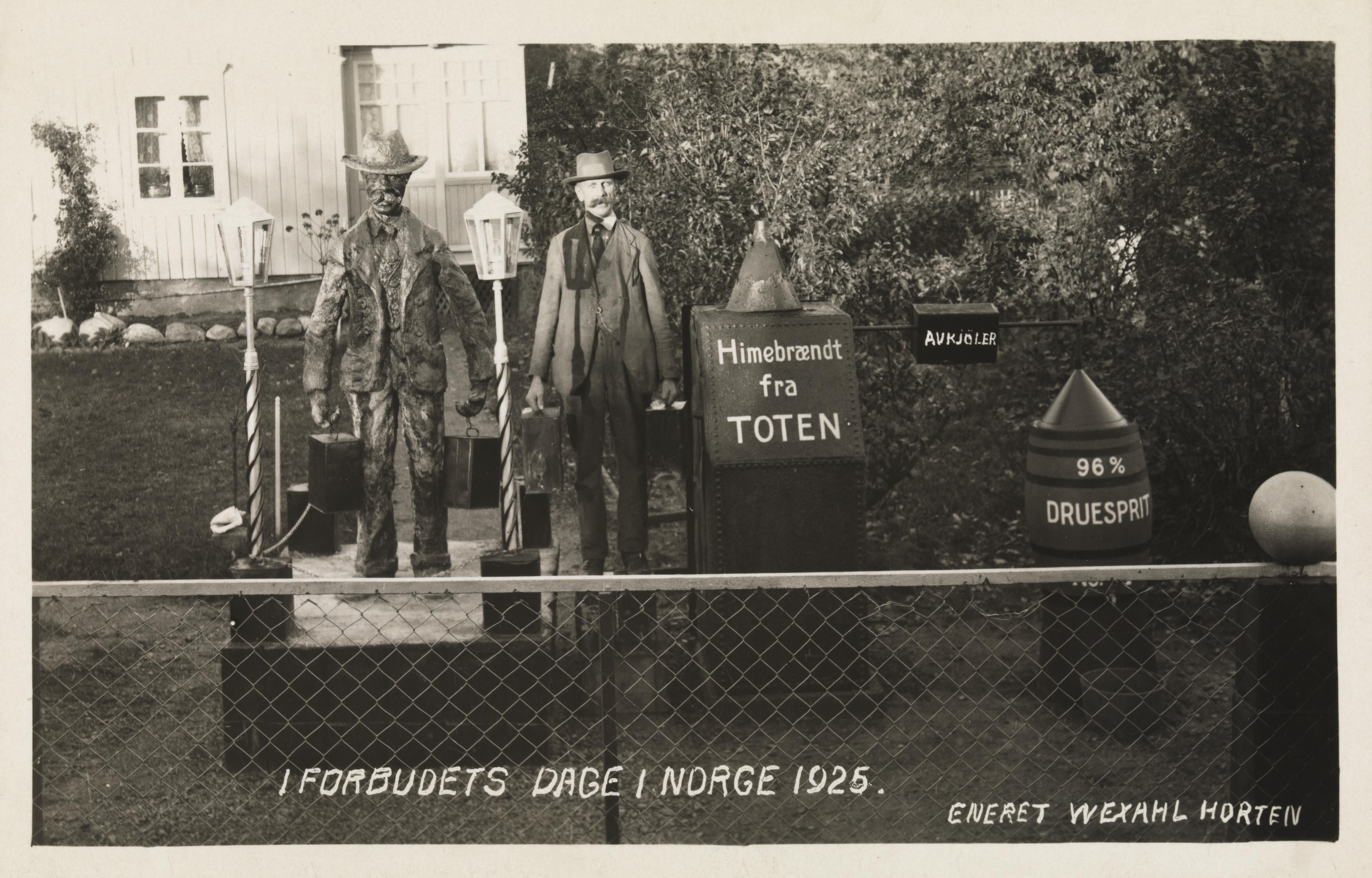 Bildet er hentet fra Nasjonalbibliotekets bildesamling. Opplysninger sakset fra Postkort fra Horten: «I Nordre Enggate 12 i Horten holdt vognmann Oluf Wexhal til. Han var en riktig skøyer og en del av smuglermiljøet i forbudstiden som varte fra 1919 til 1926. Arthur Omre, som vokste opp i Ollebakken 12, skrev om smuglerne i Oslofjorden i romanen Smuglere. Vognmannen hadde mange påfunn som holdt både politi og revyforfattere i ånde. Postkortene er utgitt av Wexahl selv.» Tittel / Title: I forbudets dage i Norge 1925 Motiv / Motif: Postkort. I Norge var det fra 1916-1927 forbud mot produksjon, import, transport, omsetning og skjenking av brennevin. Dato / Date: 1925 Fotograf / Photographer: ukjent / unknown Utgiver / Publisher: Wexahl Eier / Owner Institution: Nasjonalbiblioteket / National Library of Norway Lenke / Link: Bildesignatur / Image Number: blds_03806 Opplysninger sakset fra Postkort fra Horten: «I Nordre Enggate 12 i Horten holdt vognmann Oluf Wexhal til. Han var en riktig skøyer og en del av smuglermiljøet i forbudstiden som varte fra 1919 til 1926. Arthur Omre, som vokste opp i Ollebakken 12, skrev om smuglerne i Oslofjorden i romanen Smuglere. Vognmannen hadde mange påfunn som holdt både politi og revyforfattere i ånde. Postkortene er utgitt av Wexahl selv.»